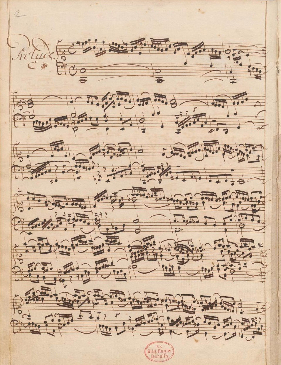 Début du prélude en ut majeur, BWV 870 du Clavier bien tempéré II (Ms. P 430, Berlin). Copie de 1744, de Johann Christoph Altnikol.